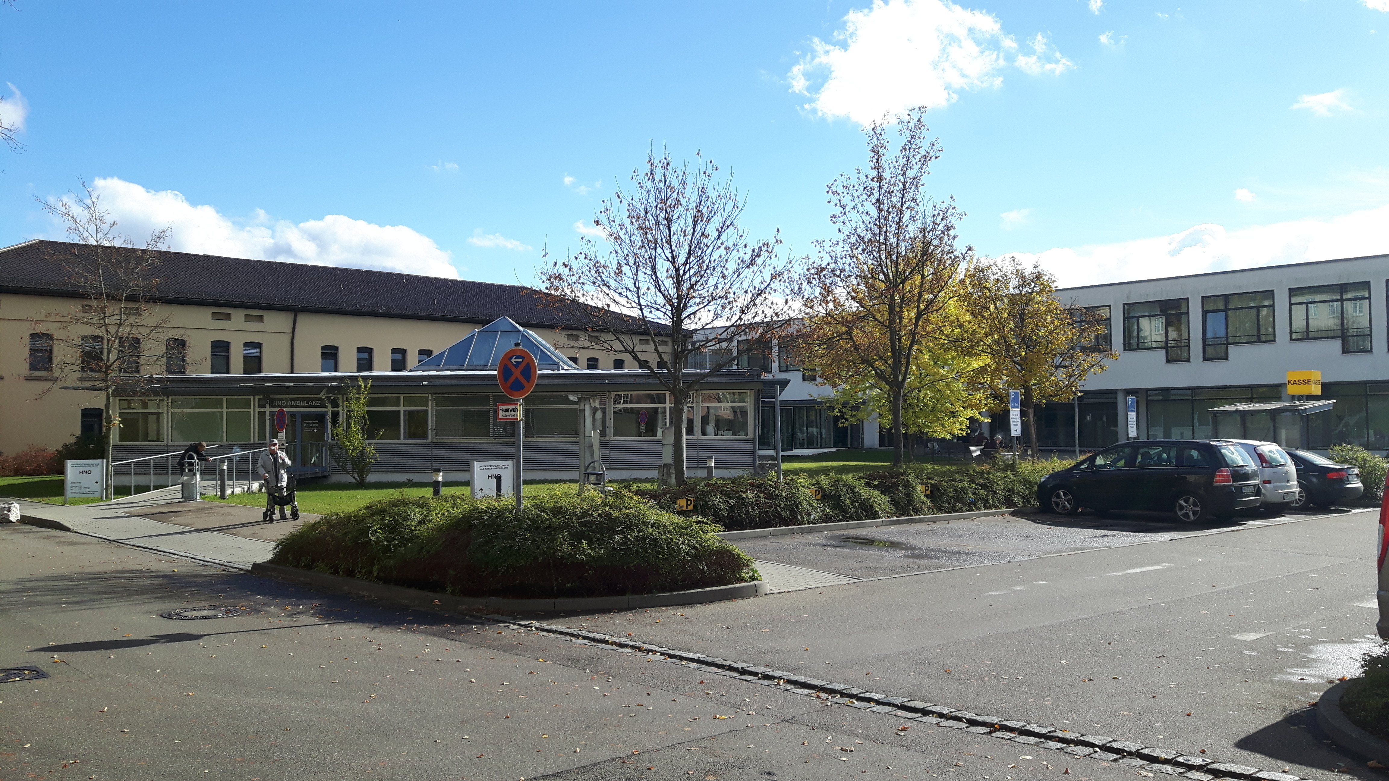 HNO-Klinik des Universitätsklinikums Ulm auf dem Michelsberg